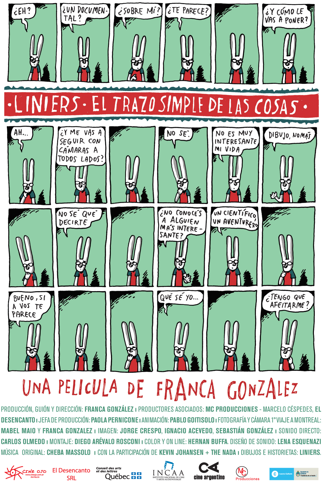 Liniers, el trazo simple de las cosas. (2010). Un largometraje documental de Franca González